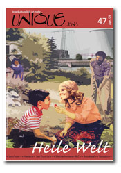 Titelbild der Unique Ausgabe 47